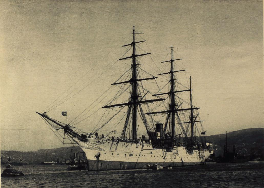 Corbeta general Baquedano, de la Armada de Chile